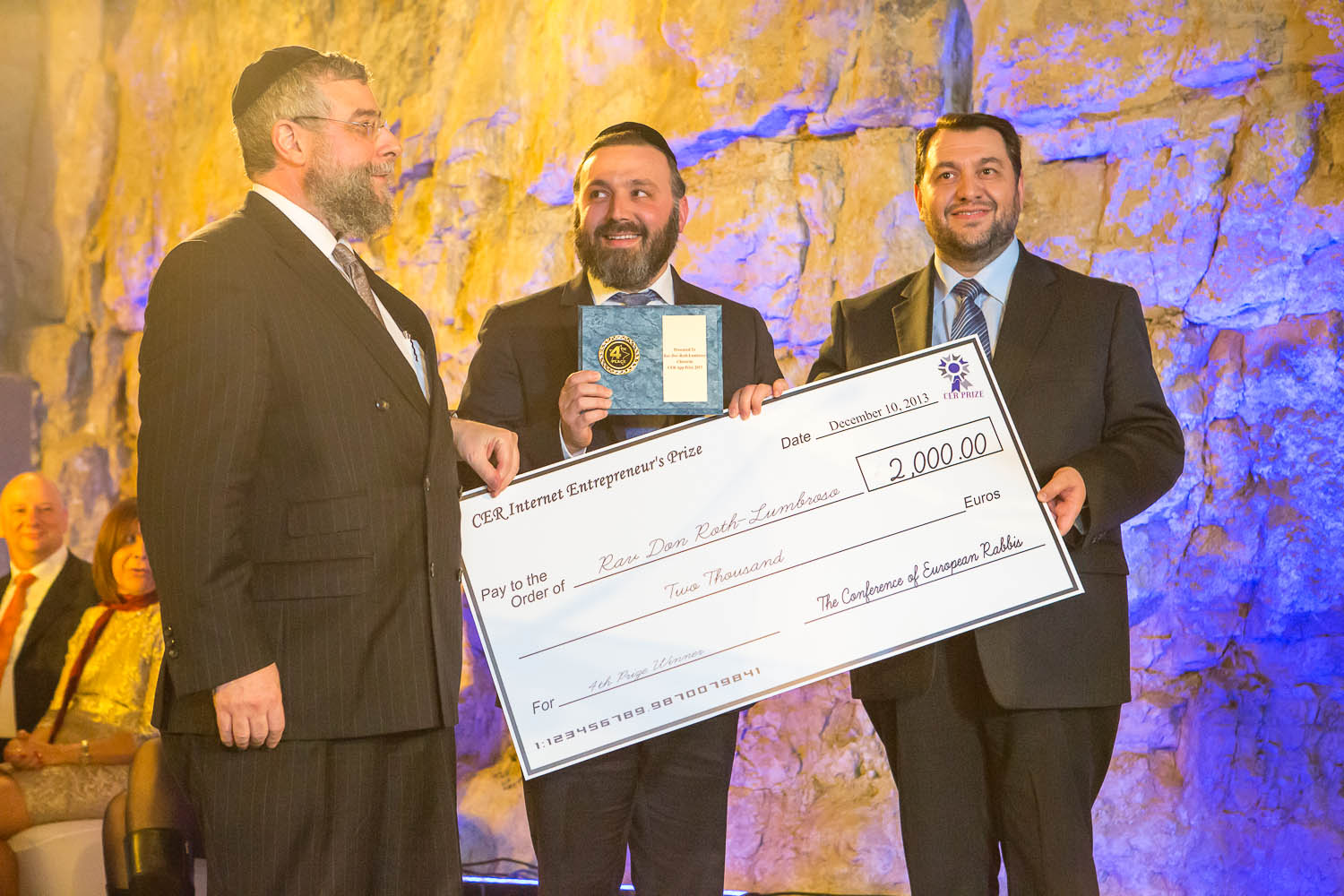 פרס יזם האינטרנט לשנת 2103 התקיים בלוקסמבורג